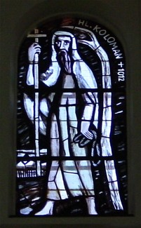 Kirchenfenster von Koloman in der Pfarrkirche Liesing von Martin Häusle.